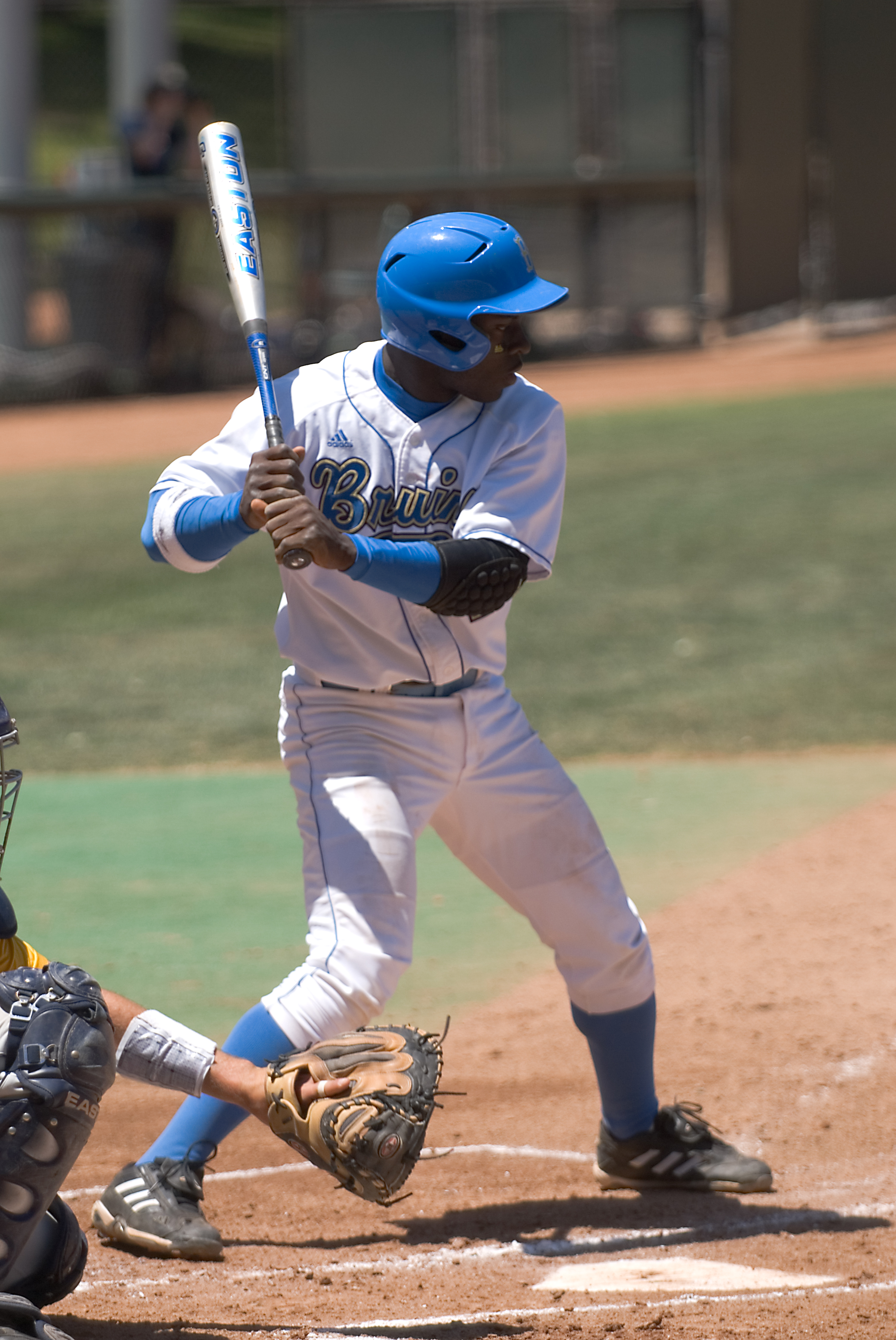 Jermaine Curtis